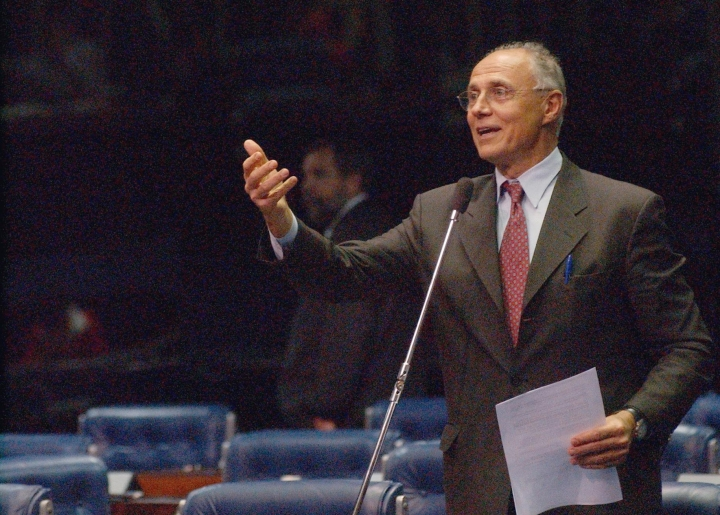 Brasília - Eduardo Suplicy anuncia no Senado que pedirá à Radiobrás a transmissão ao vivo das reuniões do Copom do Banco Central..